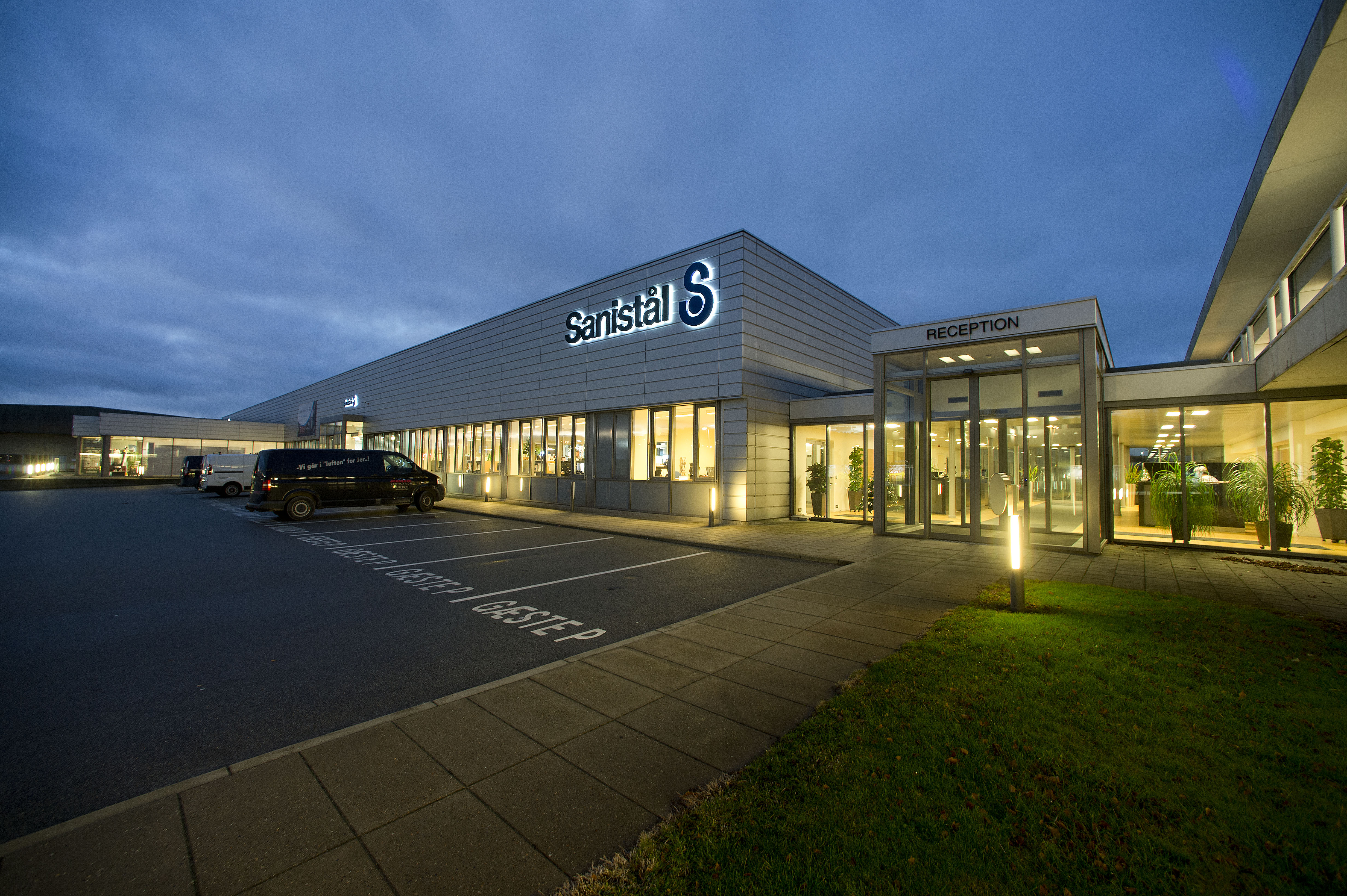 Saniståls afdeling i Aalborg